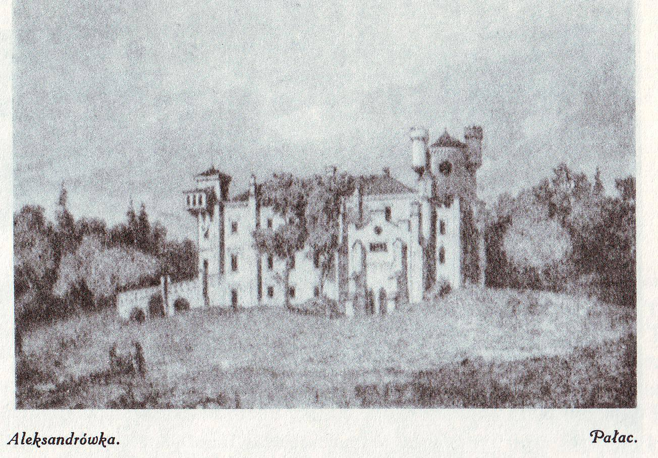 Aleksandrówka